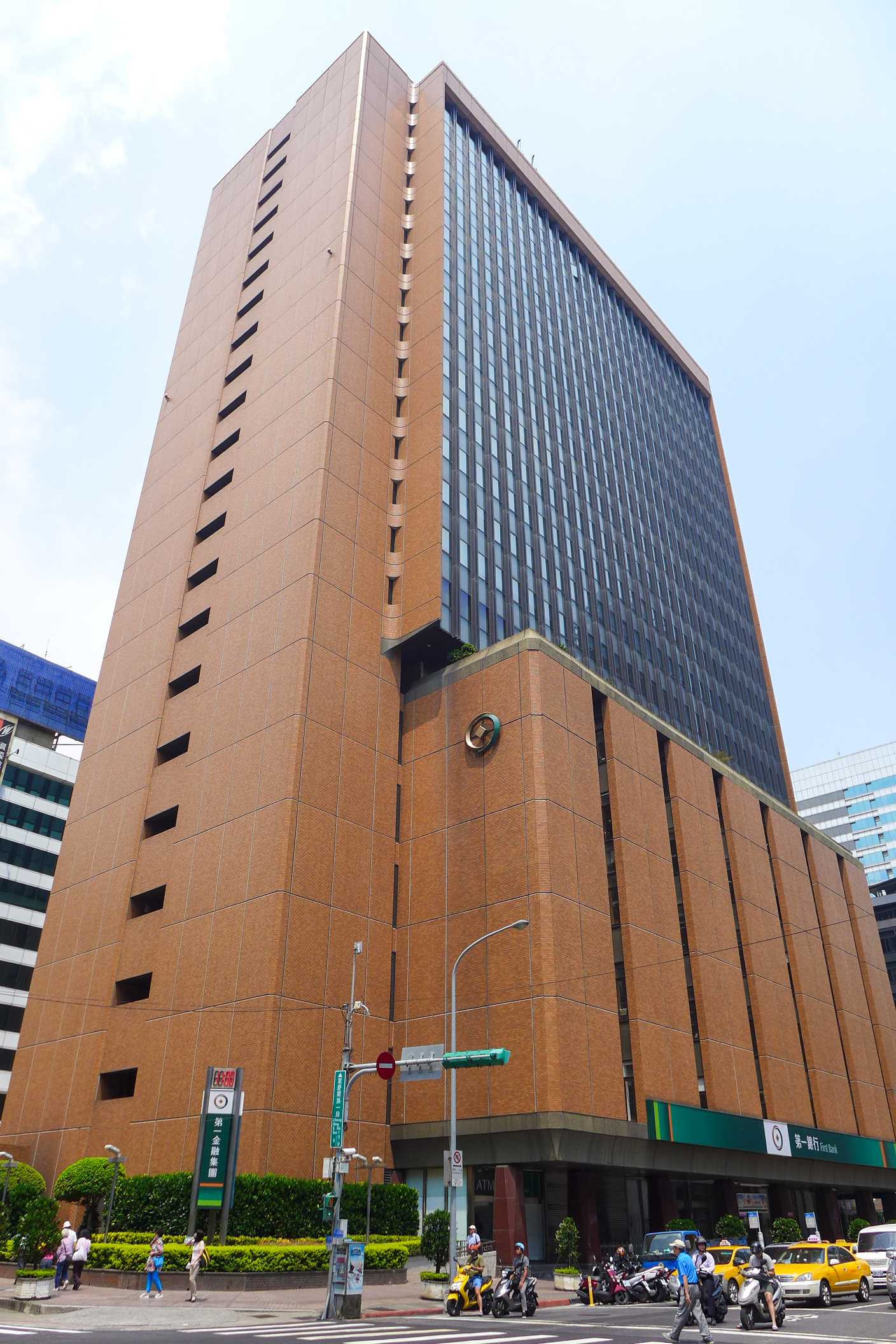 中文（台灣）: 第一金控總部大樓，地址：臺北市中正區重慶南路一段30號。